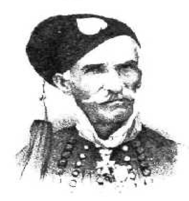 Griechischer Freiheitskämpfer, 19. Jahrhundert